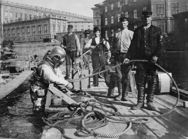 Dragning av vattenledning i Norrström, Stockholm